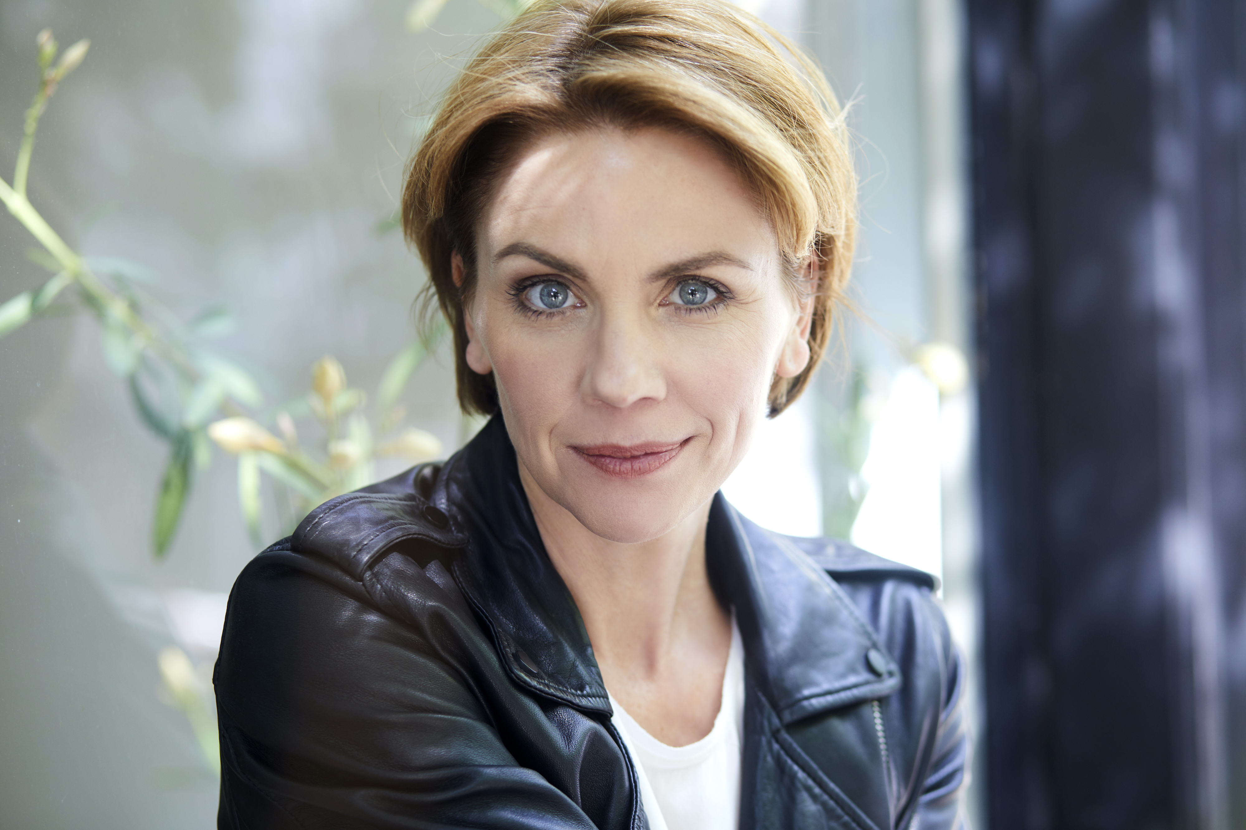 Gisa Zach, Schauspielerin, Porträt, 2019